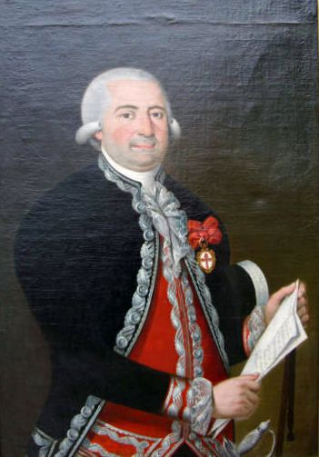 Retrato de Pedro López de Lerena, Conde de Lerena (1734-1792)